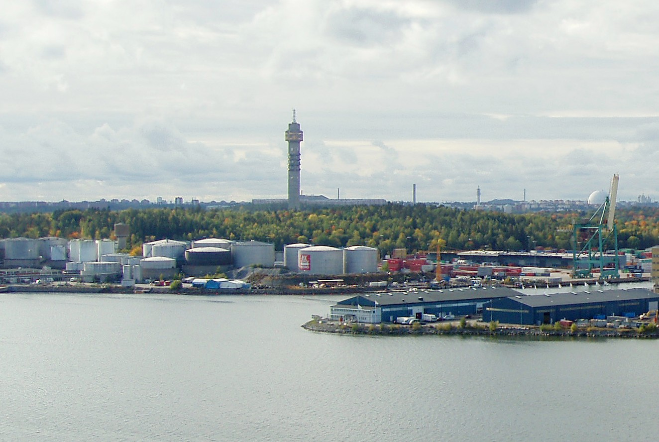 Louddens olje- och bränsledepå vid Lilla Värtan i Stockholm. Kaknästornet mitt i bild och Globen till höger. Vy från södra Lidingö.